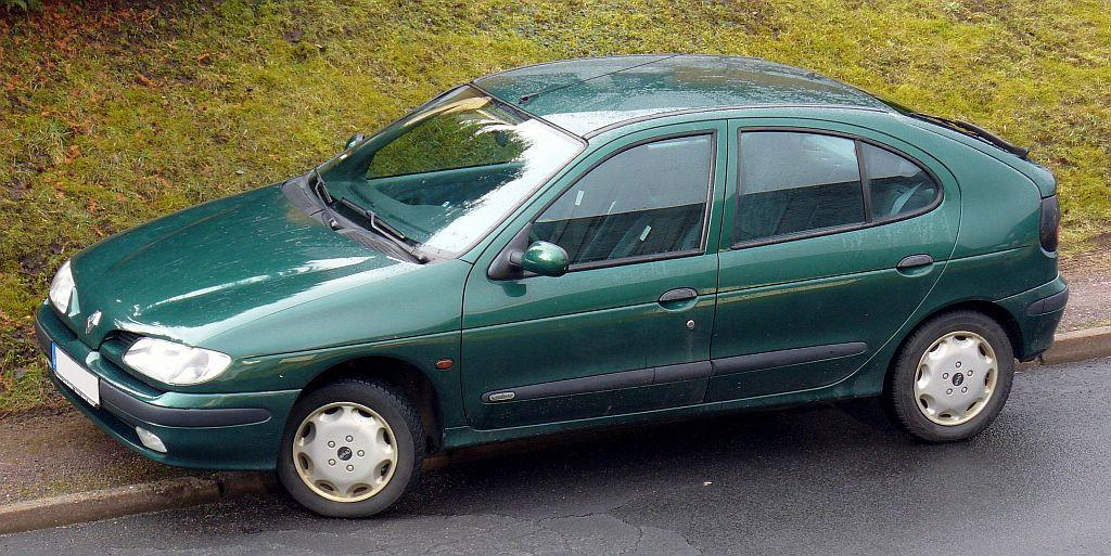 Renault Mégane I Phase I